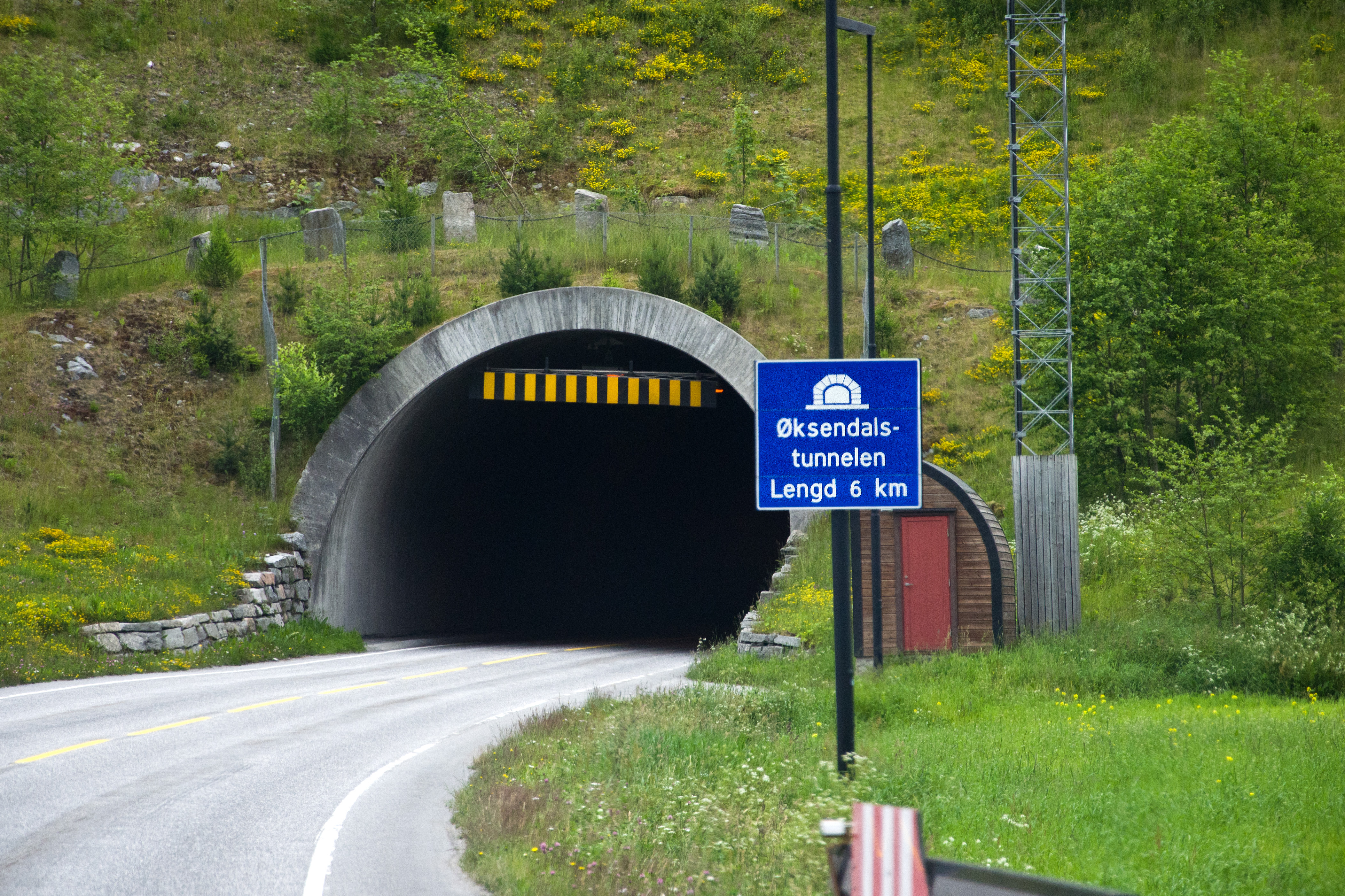 Øksendalstunnelens vestre innslag på fylkesvei 62 i Møre og Romsdal.